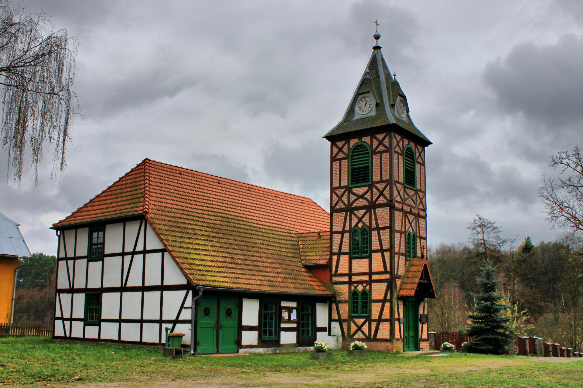 Santoczno - dawny kościół ewangelicki, obecnie rzymskokatolicki filialny pw. Przemienienia Pańskiego, XVIII, XIX